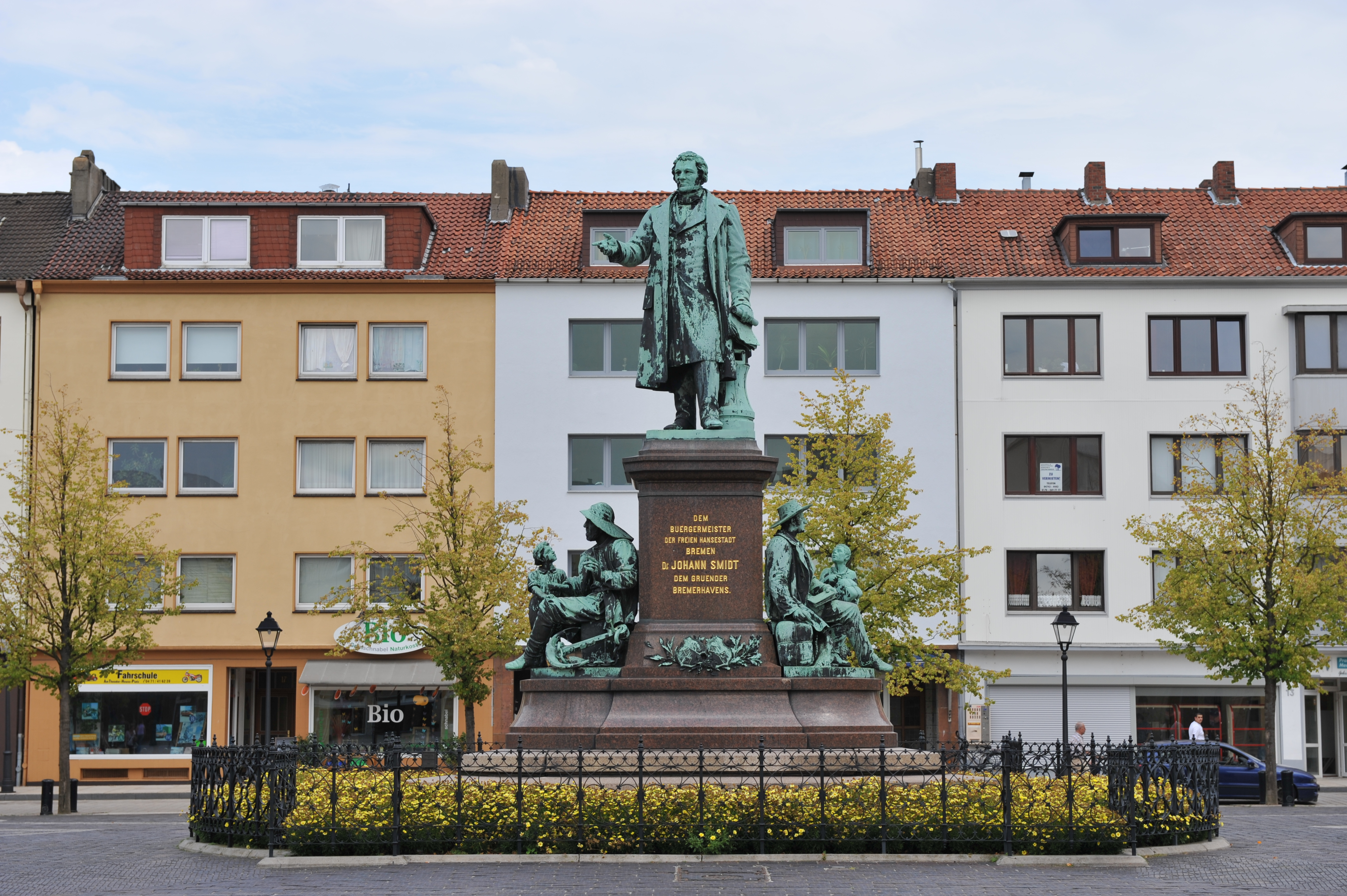 Historical building in Bremerhaven, northern Germany Denkmal Bürgermeister Johann Smidt, Theodor-Heuss-Platz, 1888 von Werner Stein Das abgebildete Objekt ist ein geschütztes Kulturdenkmal in der Freien Hansestadt Bremen, mit der Nr. 1553 beim Landesamt für Denkmalpflege registriert.